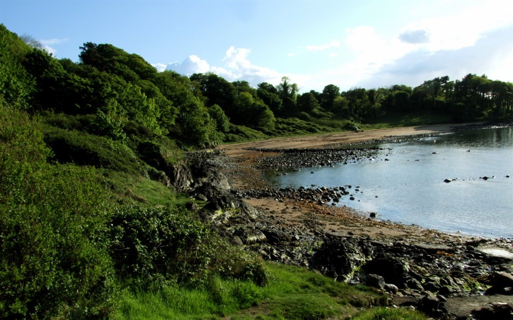 Bangor coast